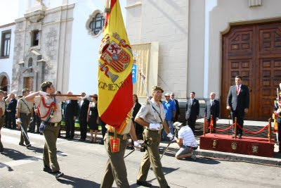 Desfile militar en Candelaria